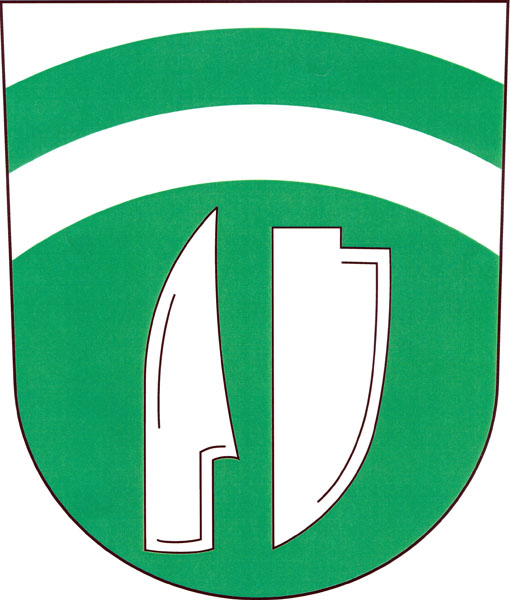 Znak obce Horní Loučky